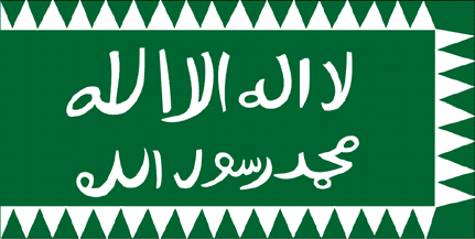 Bandera de Asir 1909-27 Imagen realizada por J. Ollé Véase también: Wikipedia:Autorizaciones/Banderas de Jaume Ollé Categoría:Banderas (imagen)